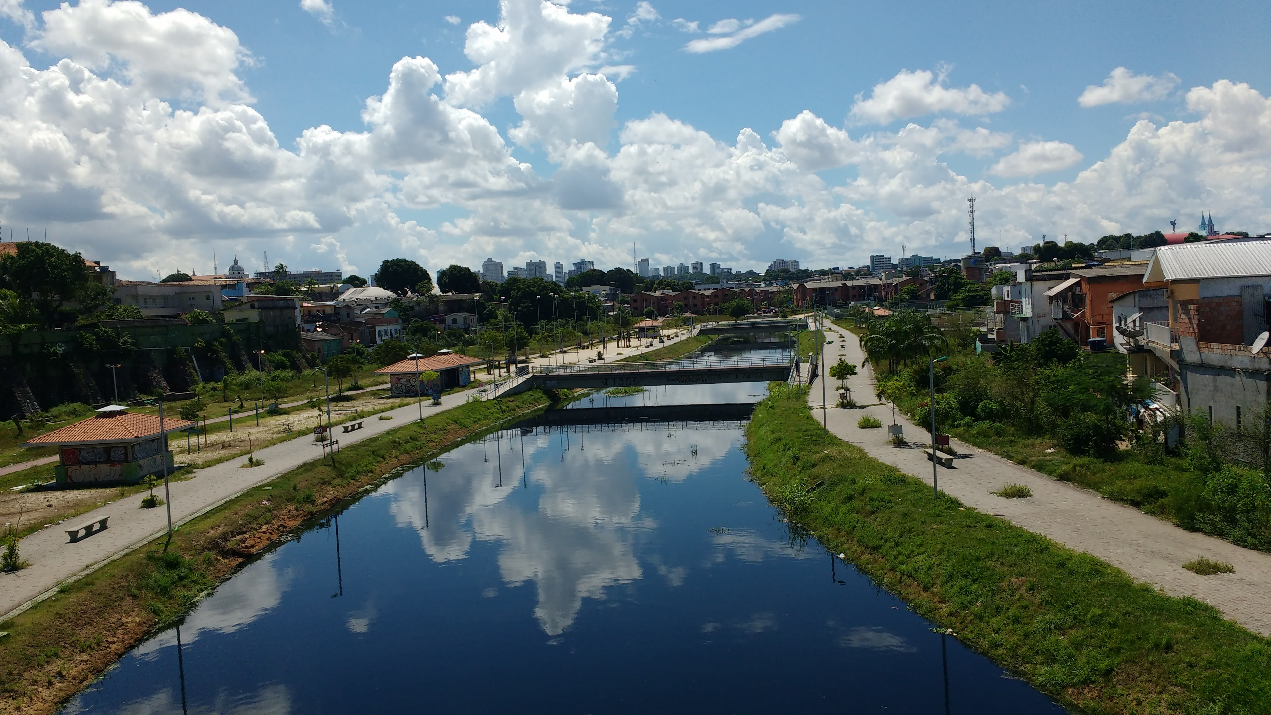 Igarapé do Mestre Chico desde o ponte Benjamim Constant no bairro da Cachoeirinha.